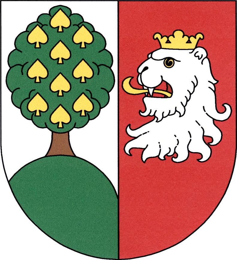 Znak obce Tachov (okres Česká Lípa)